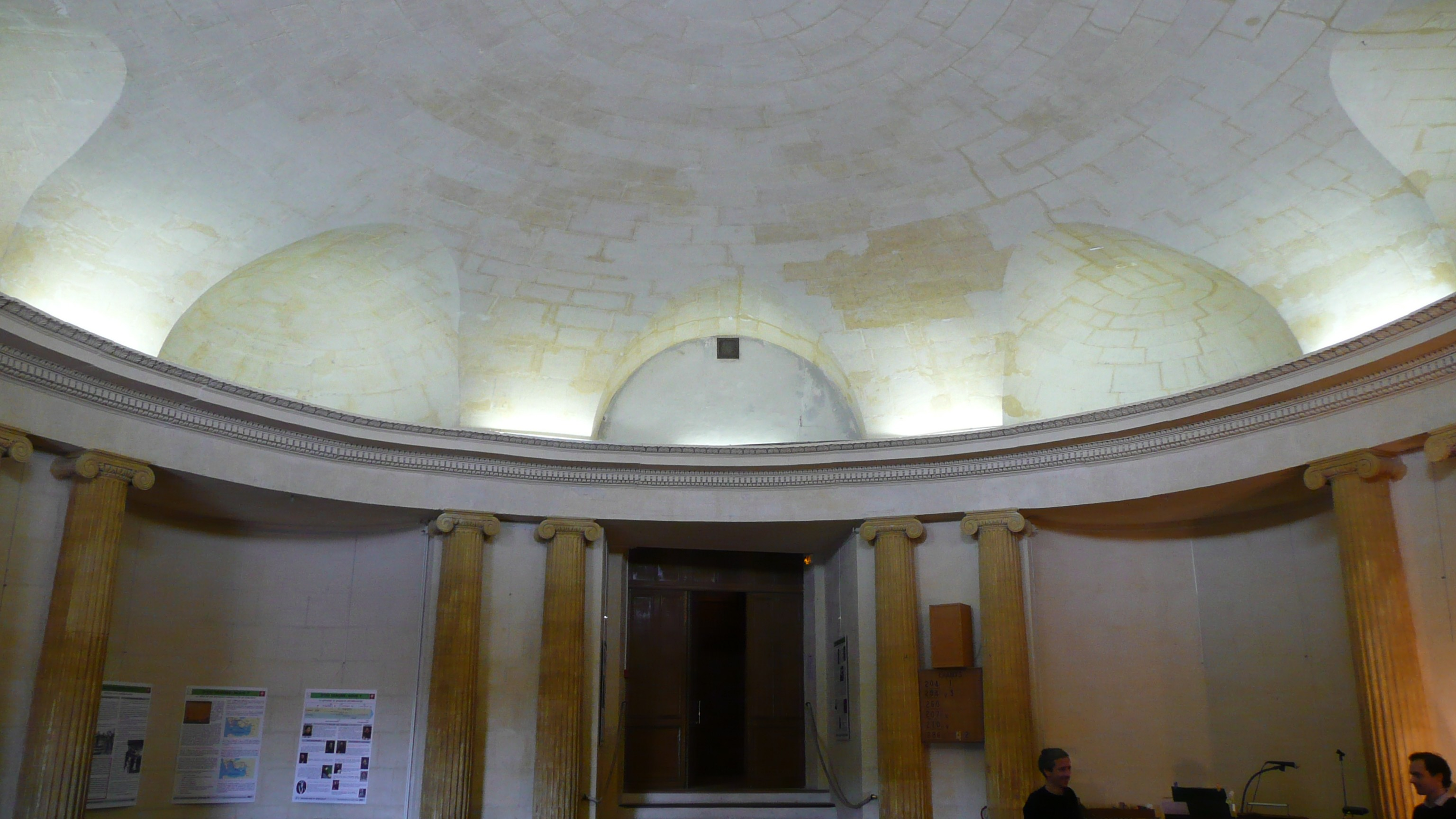 A Arles (Bouches-du-Rhône_France), ancien cercle de la Rotonde, désormais temple de l'Eglise Réformée de France, intérieur côté nord.